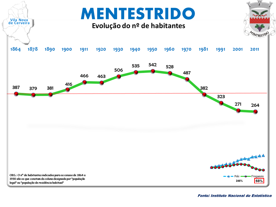 Censos 1864/2011